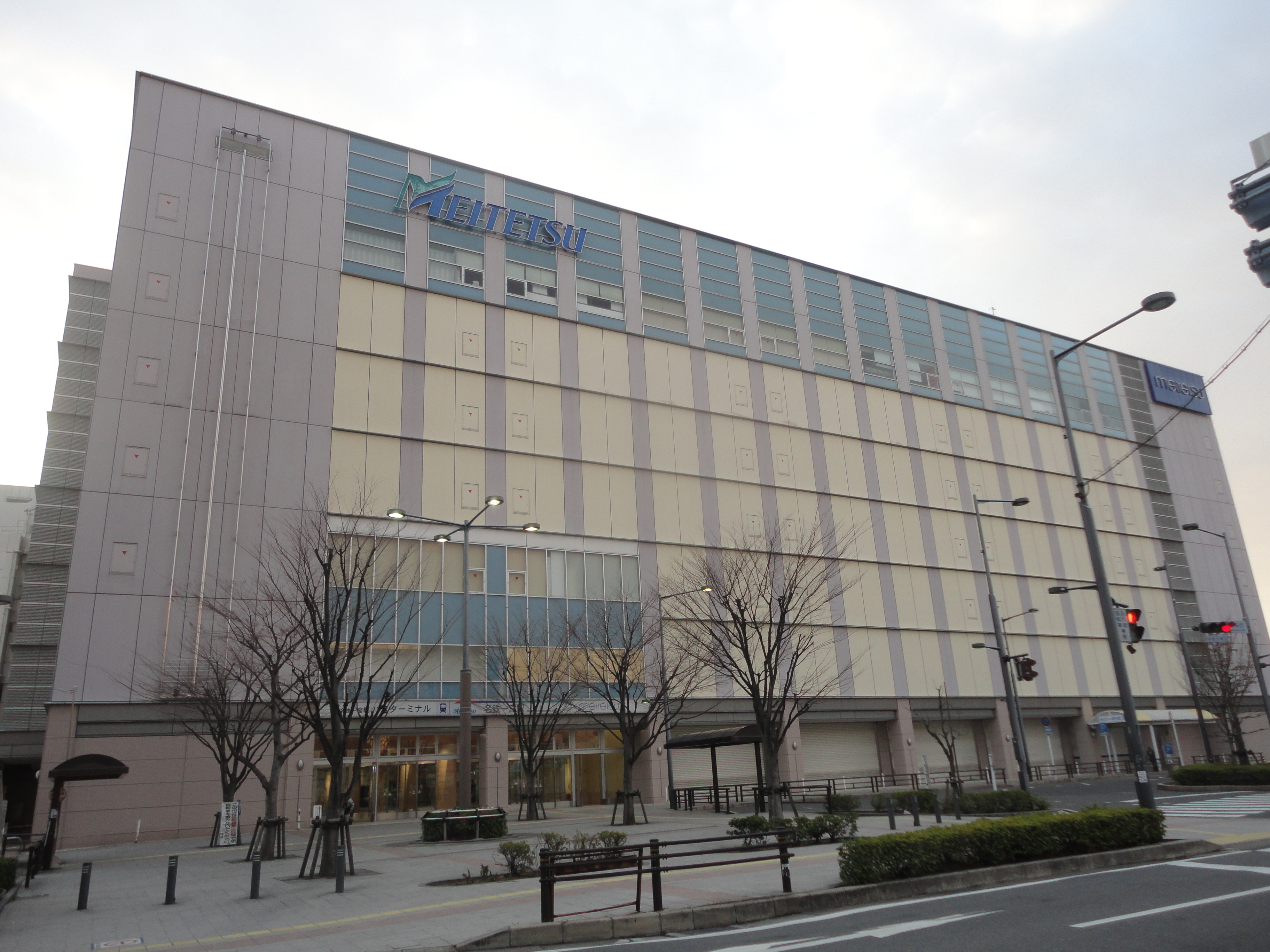 一宮駅西